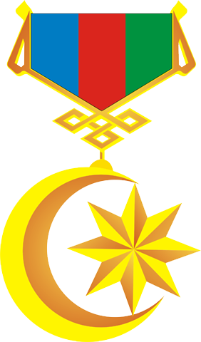 7 iyul 1992-ci ildən 6 fevral 1998-ci ilə qədər Azərbaycanın Milli Qəhrəmanının xüsusi fərqlənmə nişanı